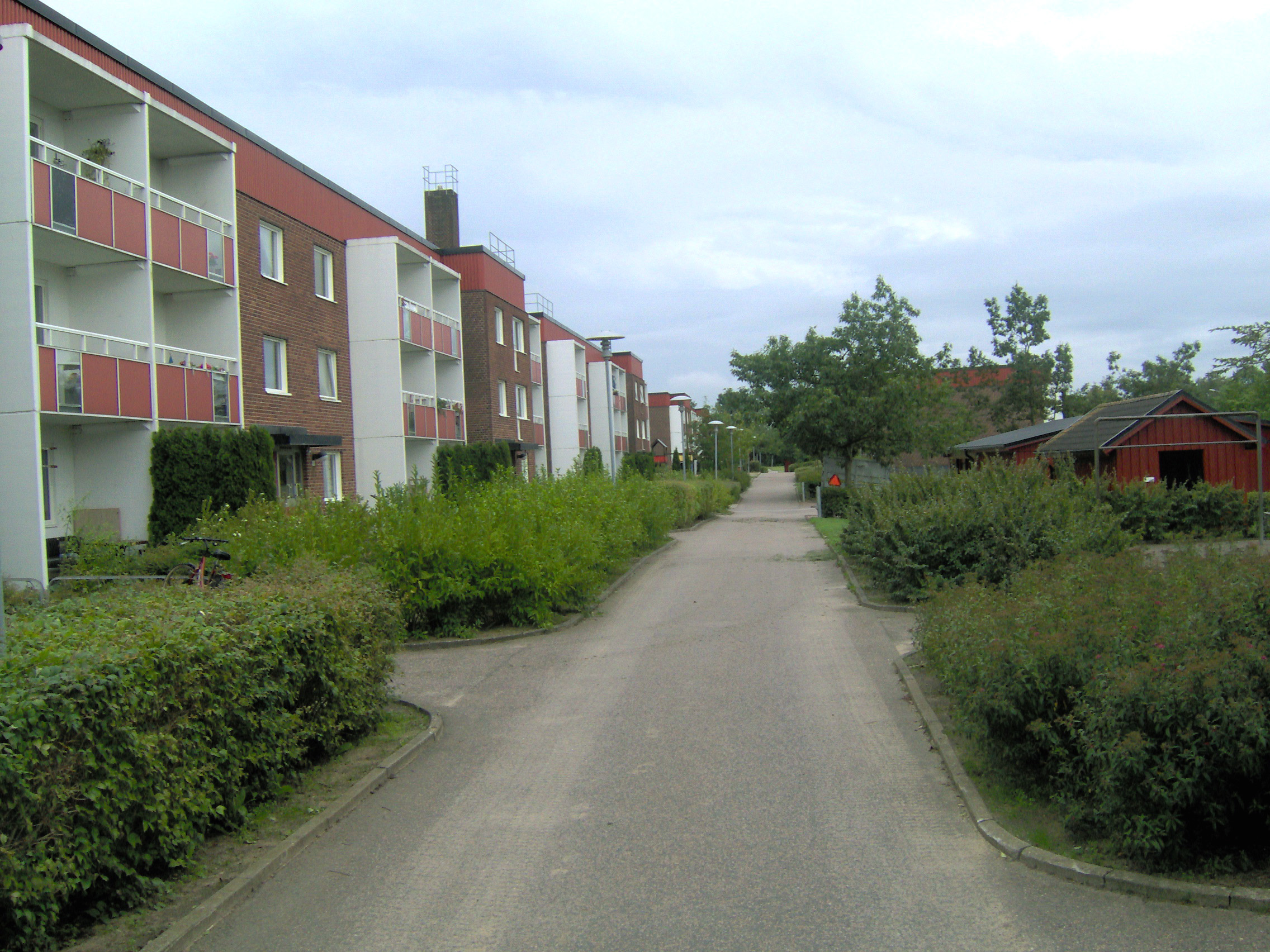 Byalaget i Södra Sandby, Skåne